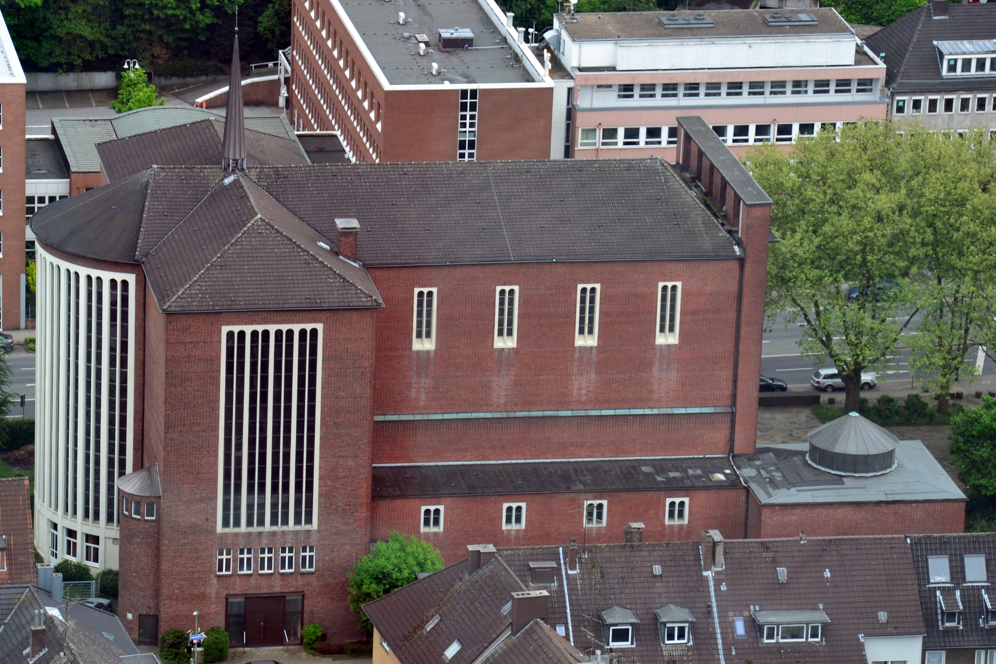 St. Engelbertkirche in Essen